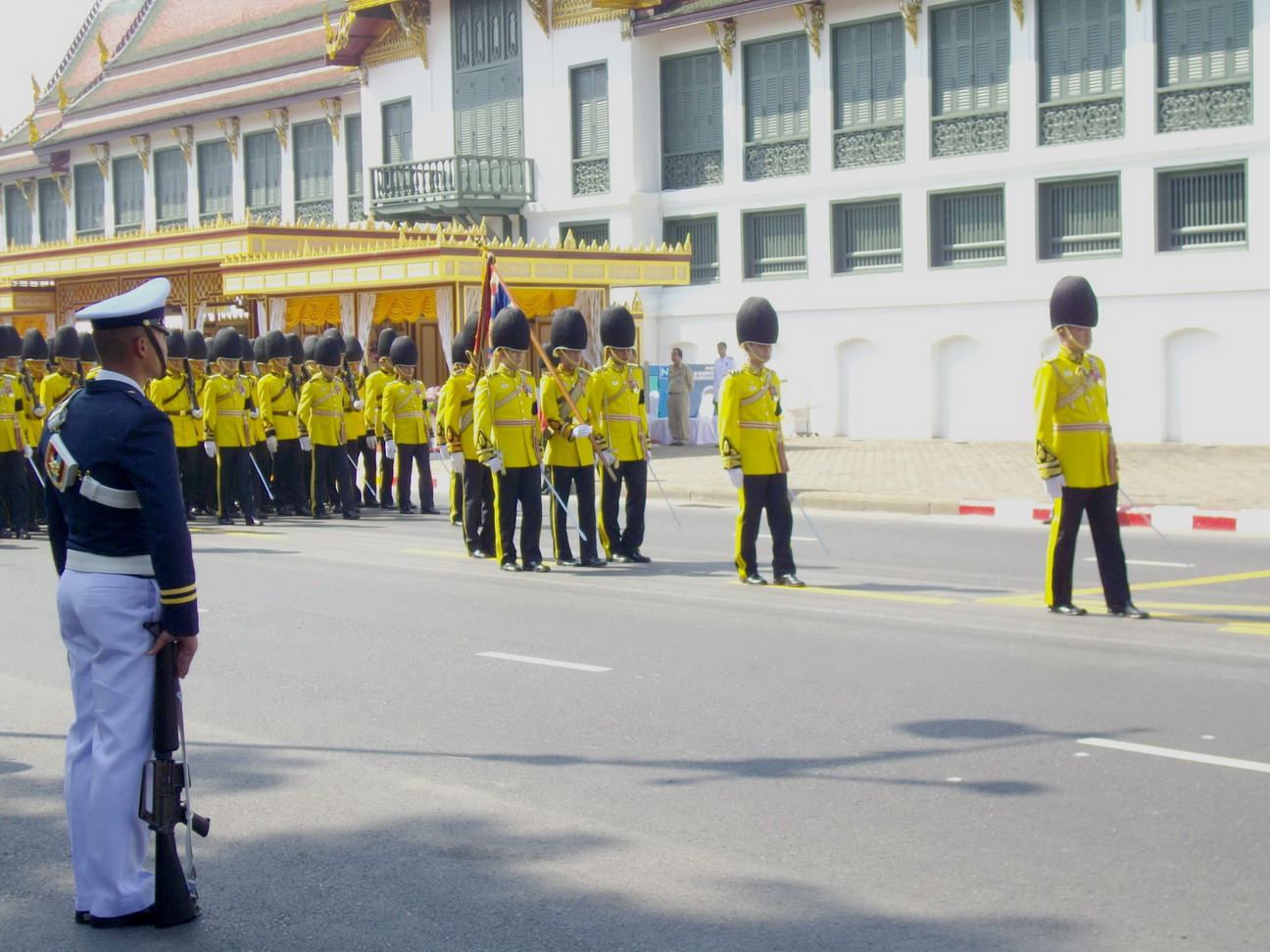 แถวทหารรักษาพระองค์จากกองพันทหารปืนใหญ่ที่ 1 รักษาพระองค์ ในริ้วกระบวนเชิญพระศพสมเด็จพระเจ้าพี่นางเธอ เจ้าฟ้ากัลยานิวัฒนา กรมหลวงนราธิวาสราชนครินทร์ ริ้วกระบวนที่ 2 หน้าพระที่นั่งสุทไธสวรรยปราสาท ถนนสนามไชย วันที่ 15 พฤศจิกายน พ.ศ. 2551